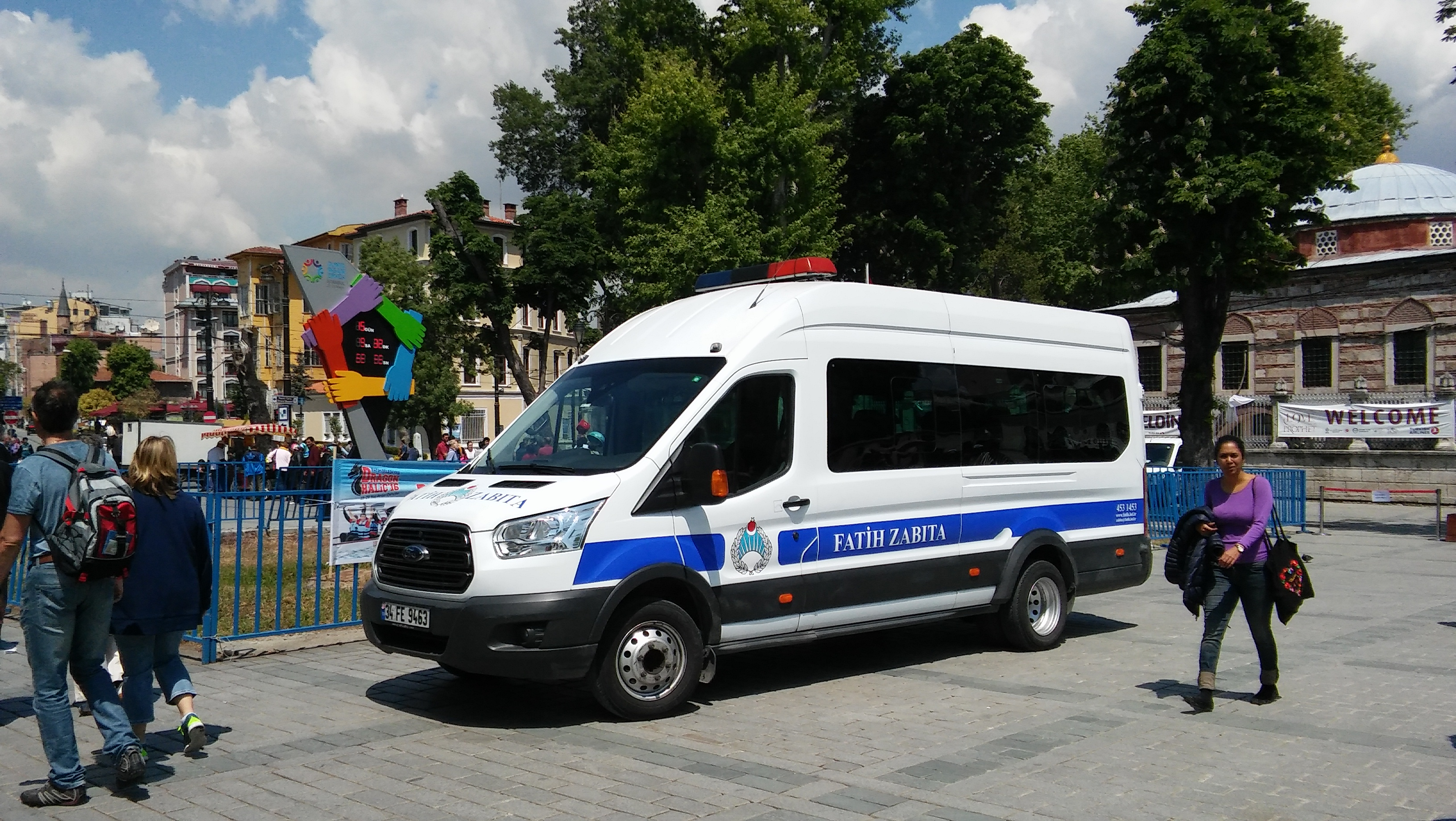 Véhicule de la police municipale d'Istanbul